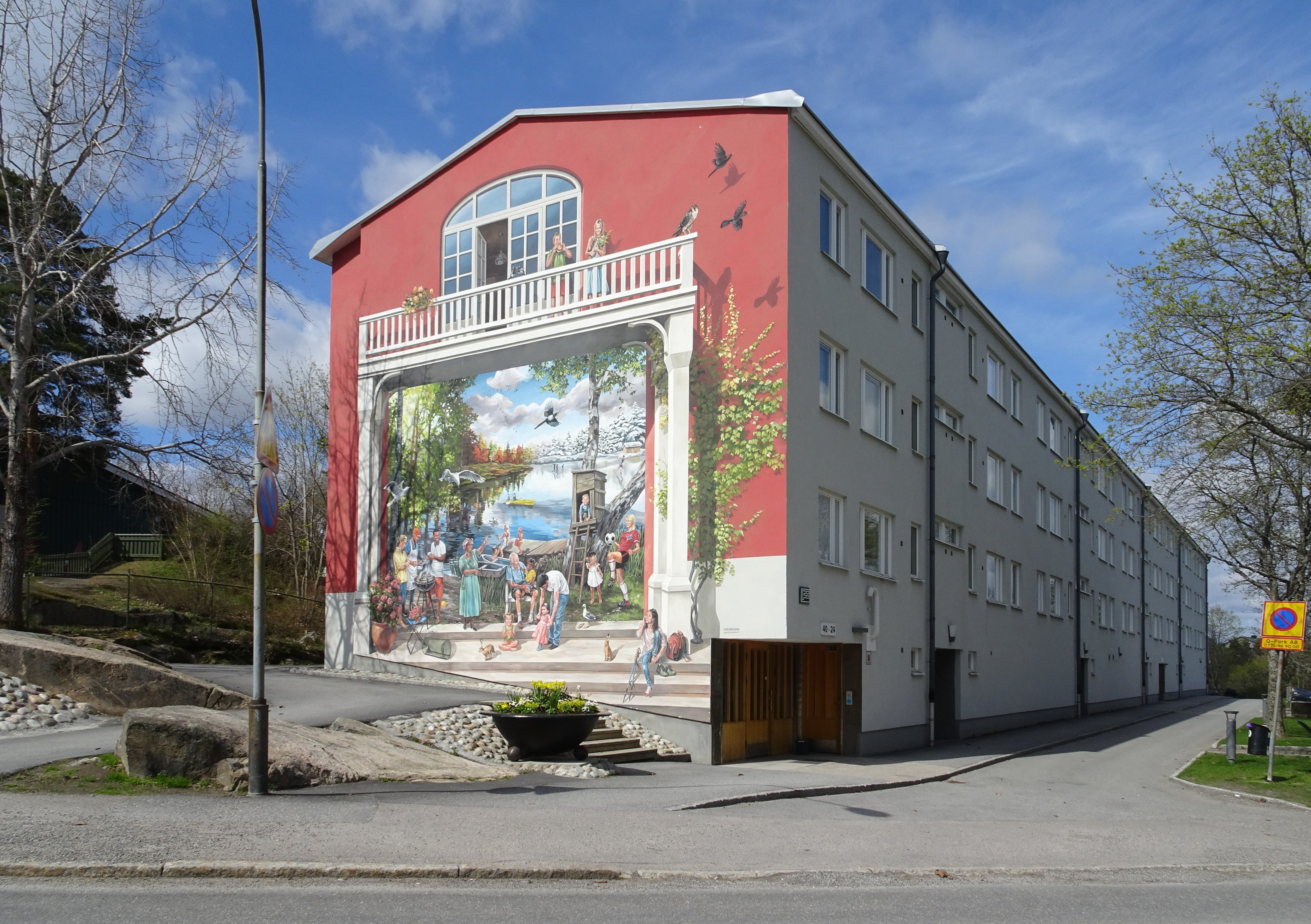 Hörnet Ullerydsbacken/Brunskogsbacken, Farsta strand, muralmålning av det franska konstnärskooperativet CitéCréation